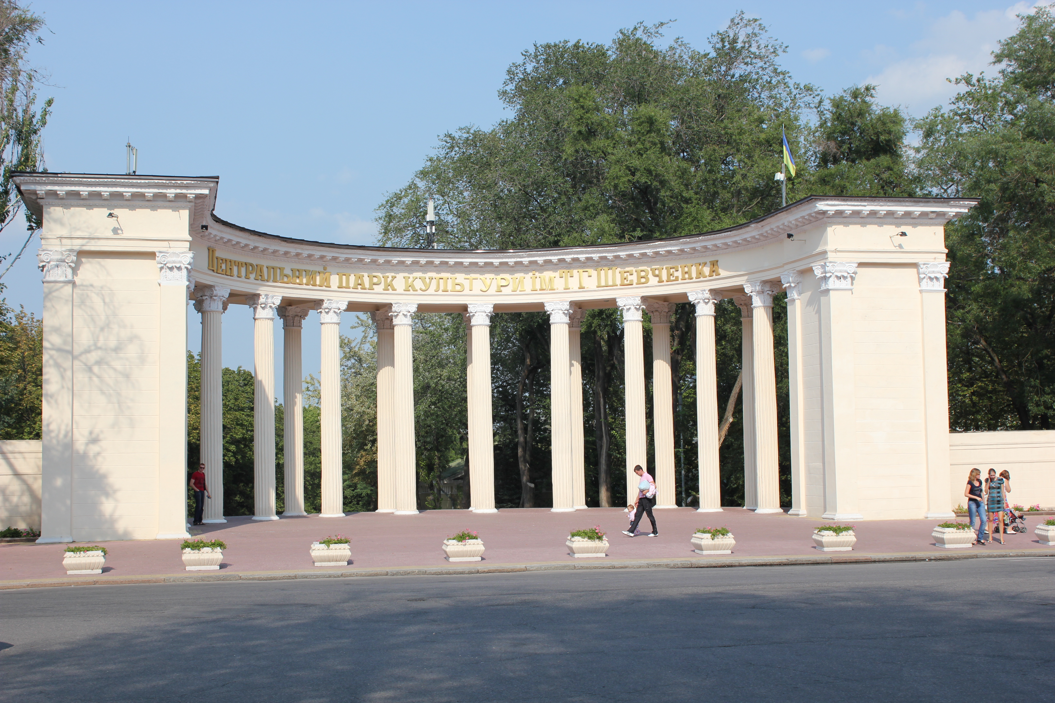 Пам'ятник О. М. Горькому